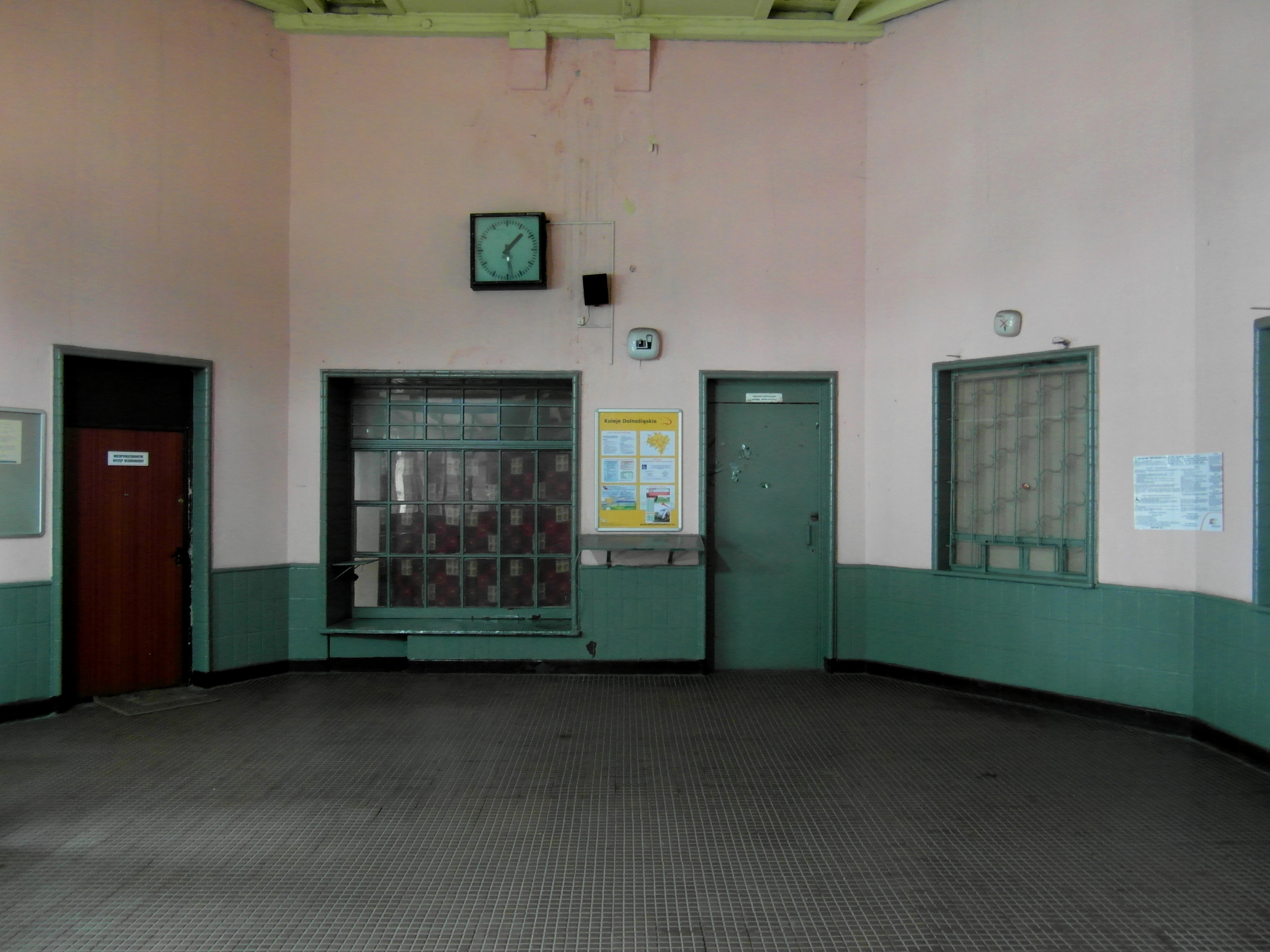 Kohlfurt - Bahnhof